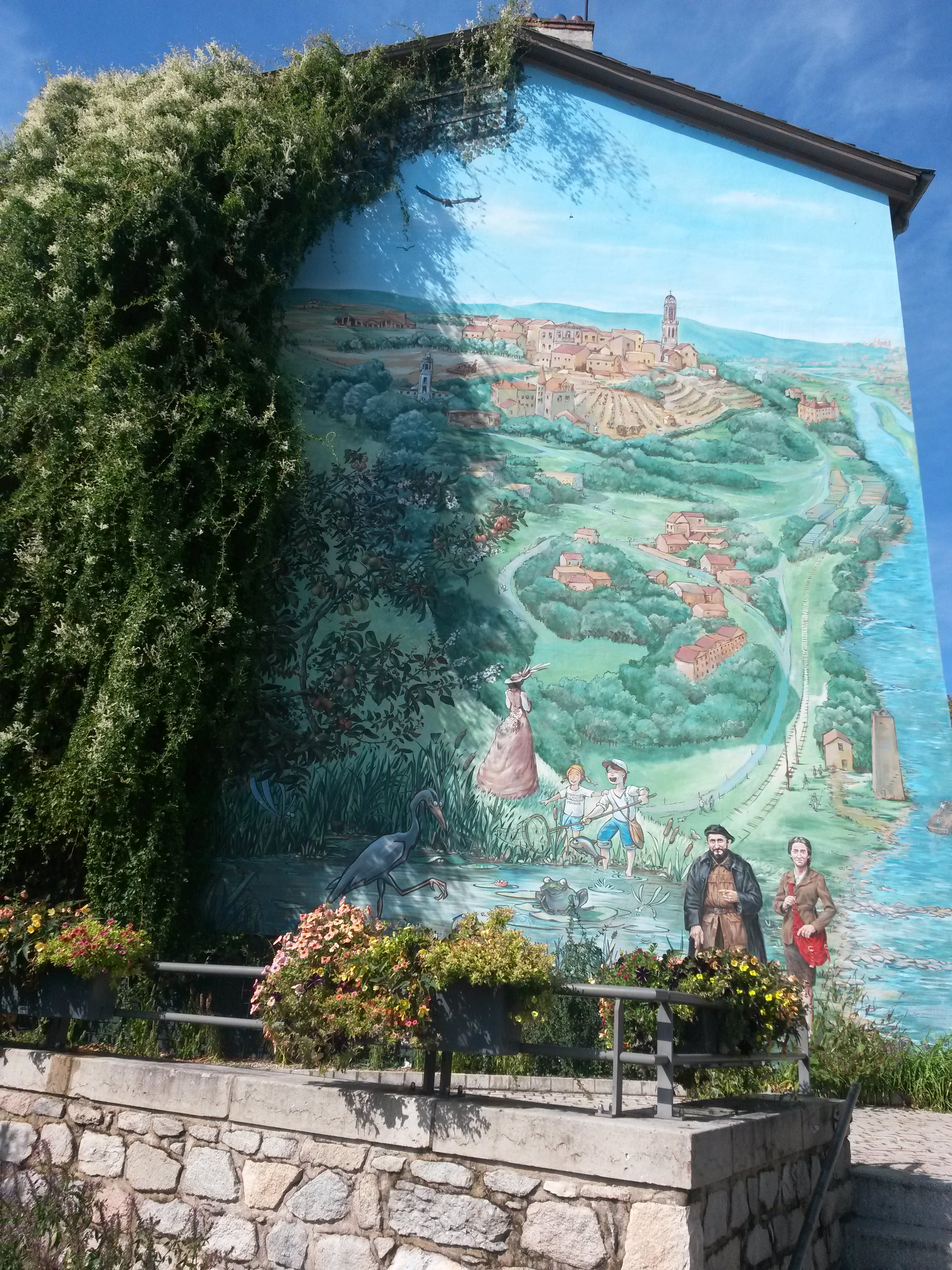 Photo de la fresque murale d'Irigny inaugurée en 2009. Elle mêle peinture, végétaux et lumière. Il s'agit d'une représentation de la commune avec les monuments et les personnages notables (clocher, châteaux, tour de traille... Abbé Pierre, Daisy Georges Martin, Marie-Dorothée Petit (de dos)...).